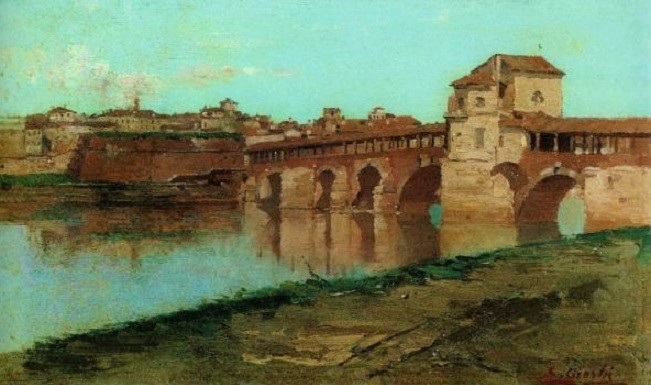 "Il ponte coperto sul Ticino", olio su tela, 19.5x33 cm., Pavia Musei Civici